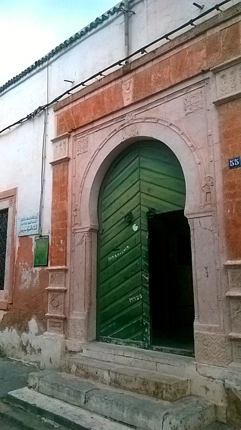 Bab Jedid, médina de Tunis, Tunisie باب الجديد، مدينة تونس العتيقة ، تونس